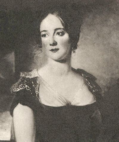 Hedda Wrangel (1792-1833)